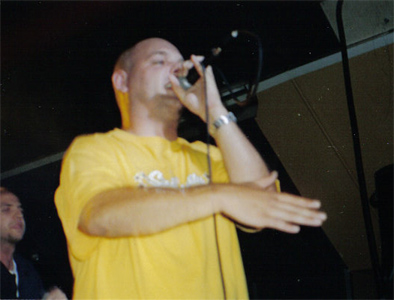 Foto van rapper Tim Beumers